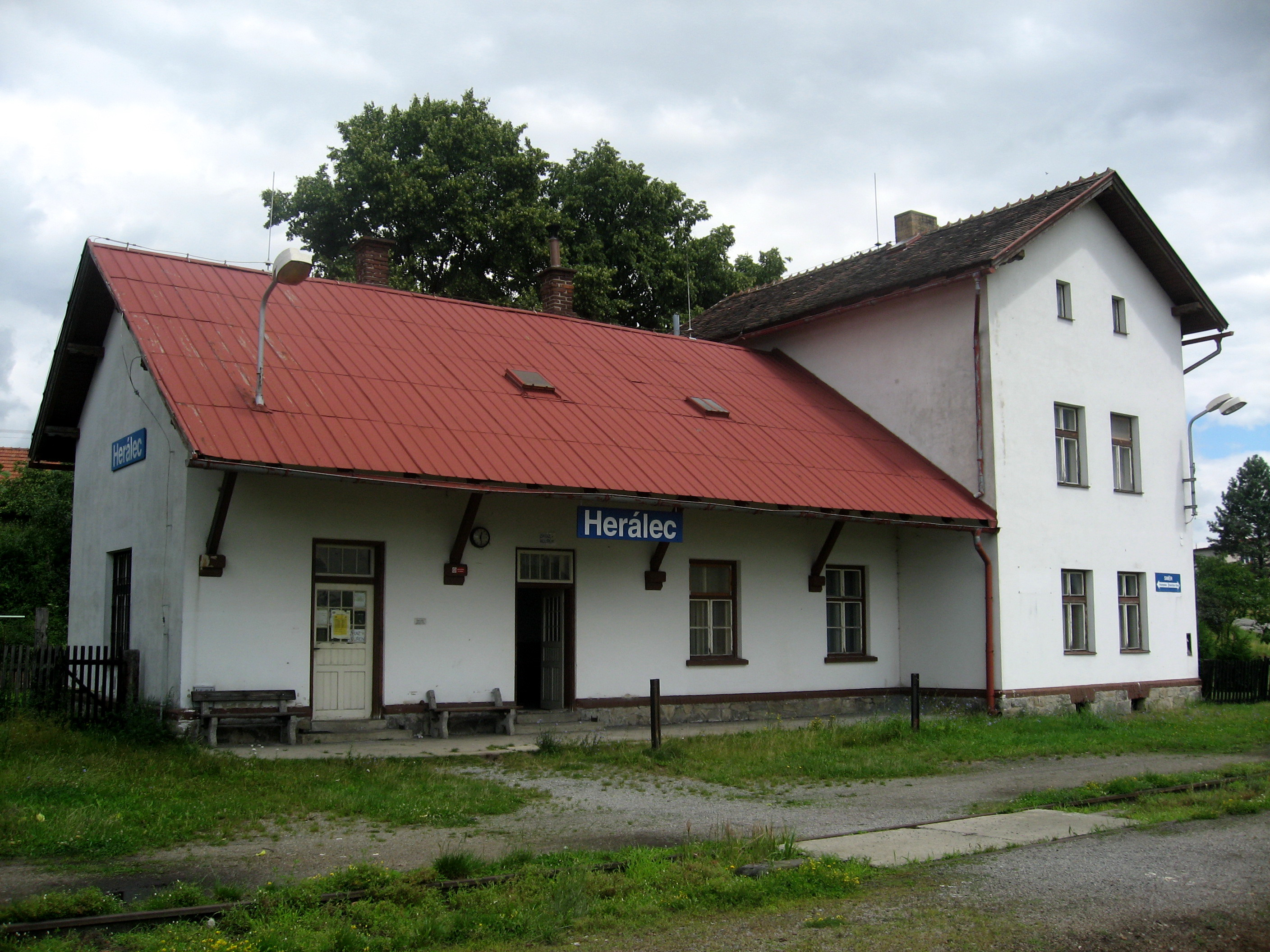 Herálec, železniční nádraží